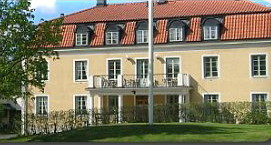 Nyvillan, vandrarhem och konferensboende på Hagaberg i Södertälje